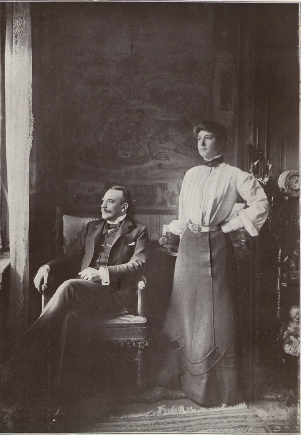 Albert Patry, deutscher Theater- und Stummfilmschauspieler (1864-1938), mit seiner Ehefrau Maria, geb. Reisenhofer, 1905.